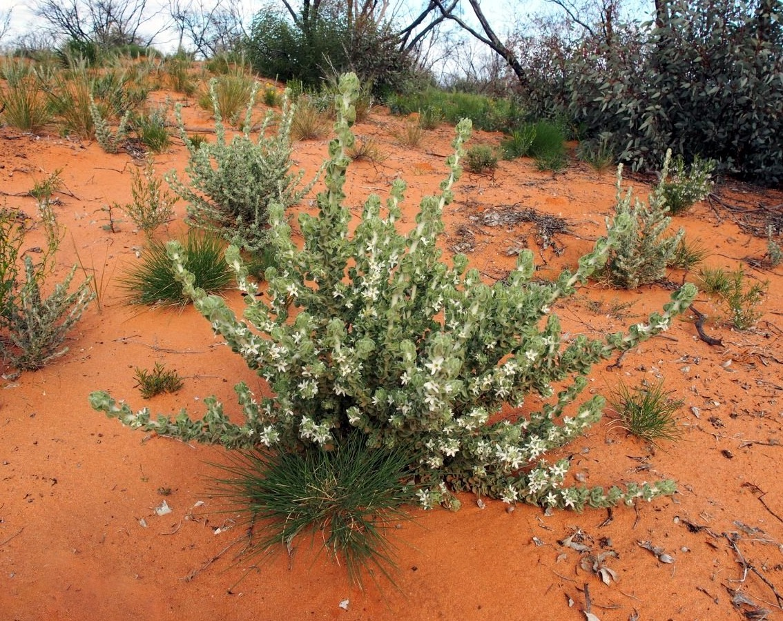 Grammosolen dixonii en Calperum Station, Estado de South Australia.